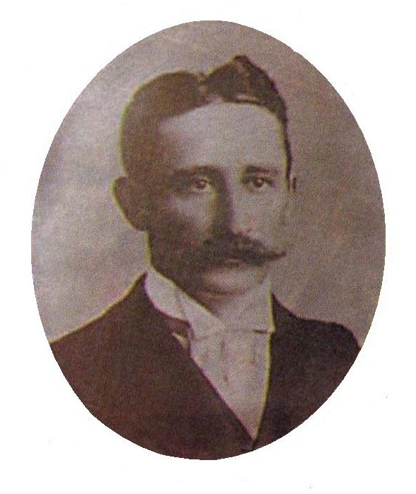 Empresario Osornino, fundador Cerveceria Jorge Aubel